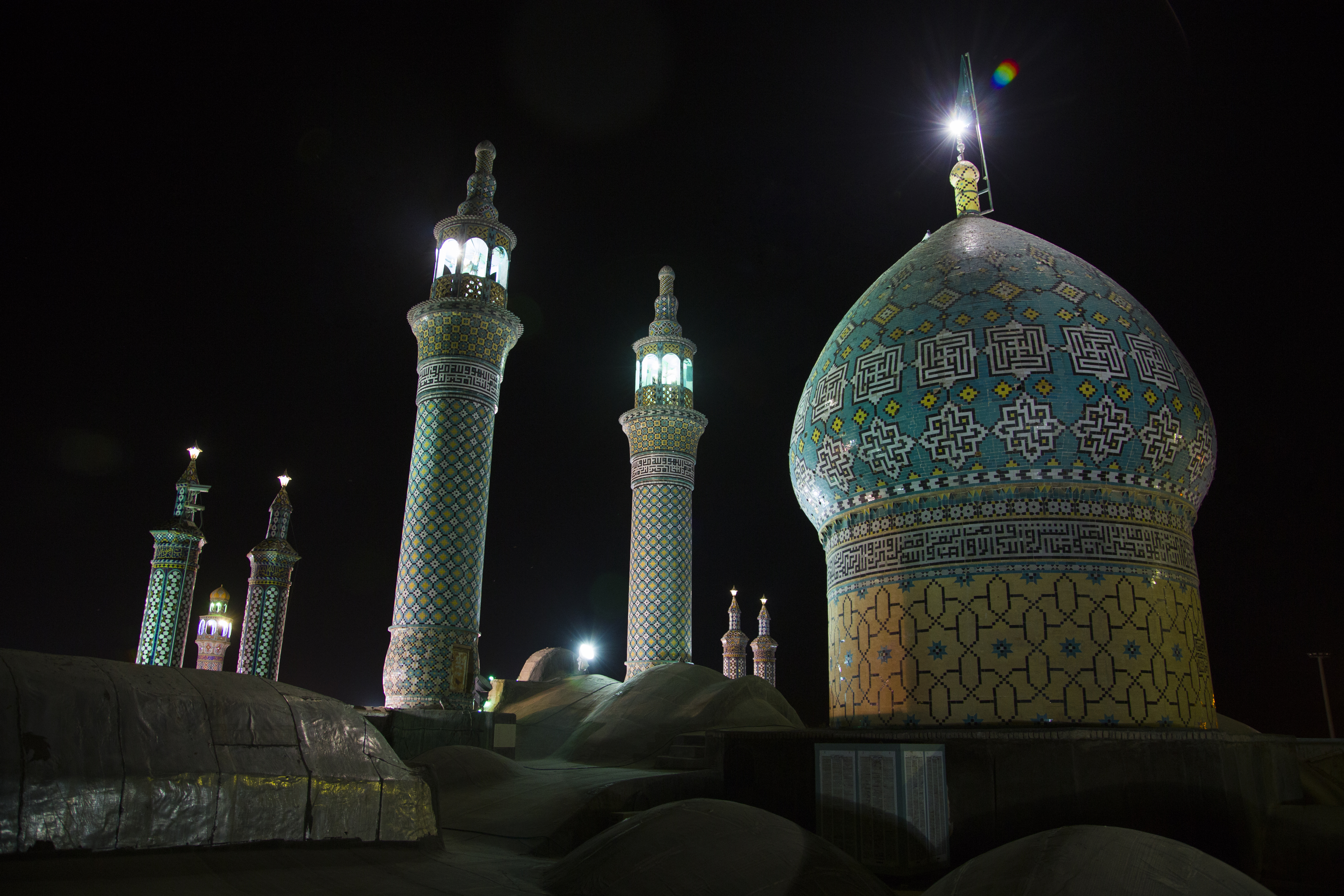 محمد اوسط مشهور به هلال علی و محمد هلال، (۱۴–۶۴ ه. ق)، فرزند بلافصل علی بن ابیطالب و نوه محمد می‌باشد.مقبره این امامزاده در شهرستان آران و بیدگل می باشد.